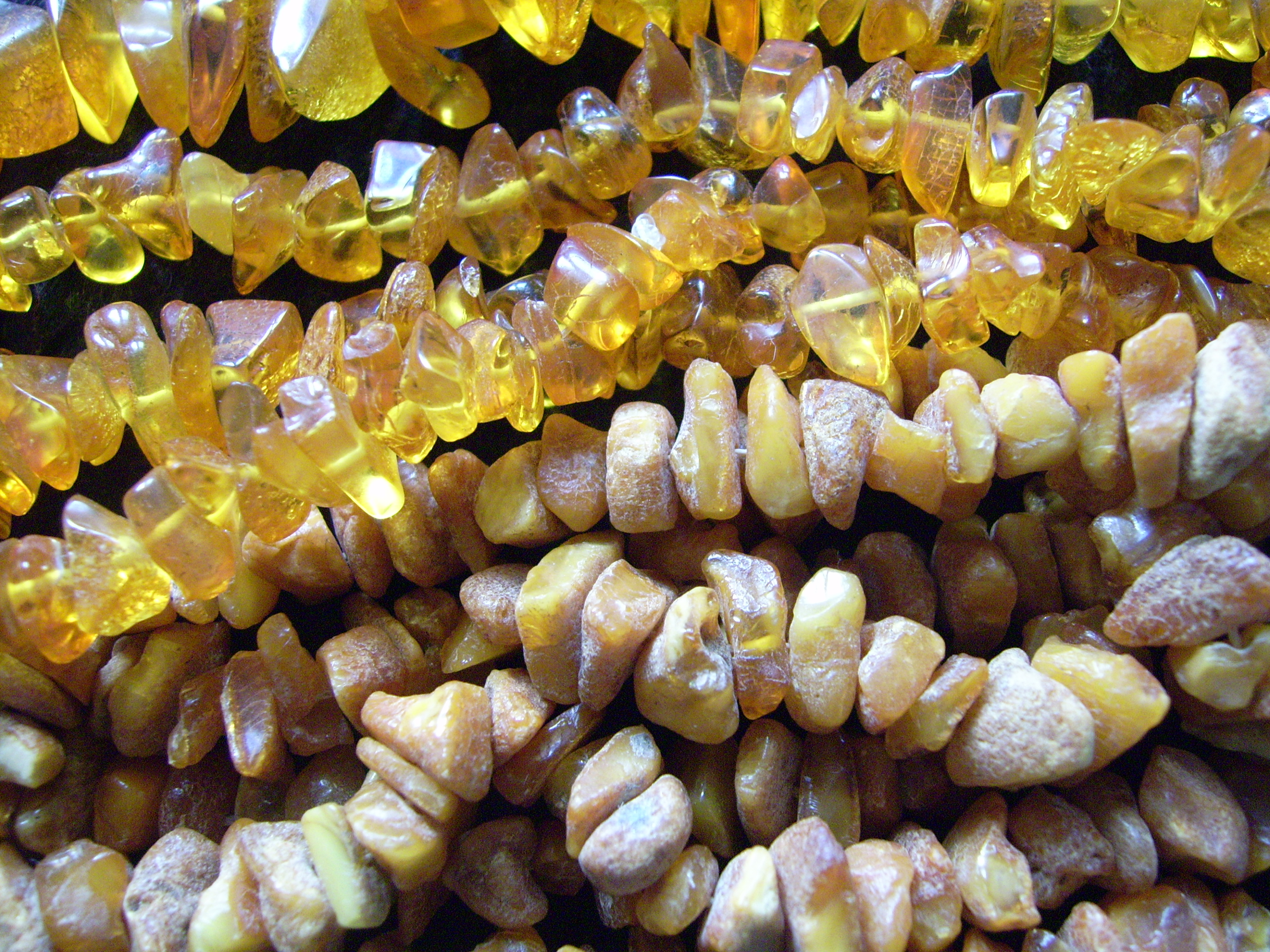 Bursztynowe korale